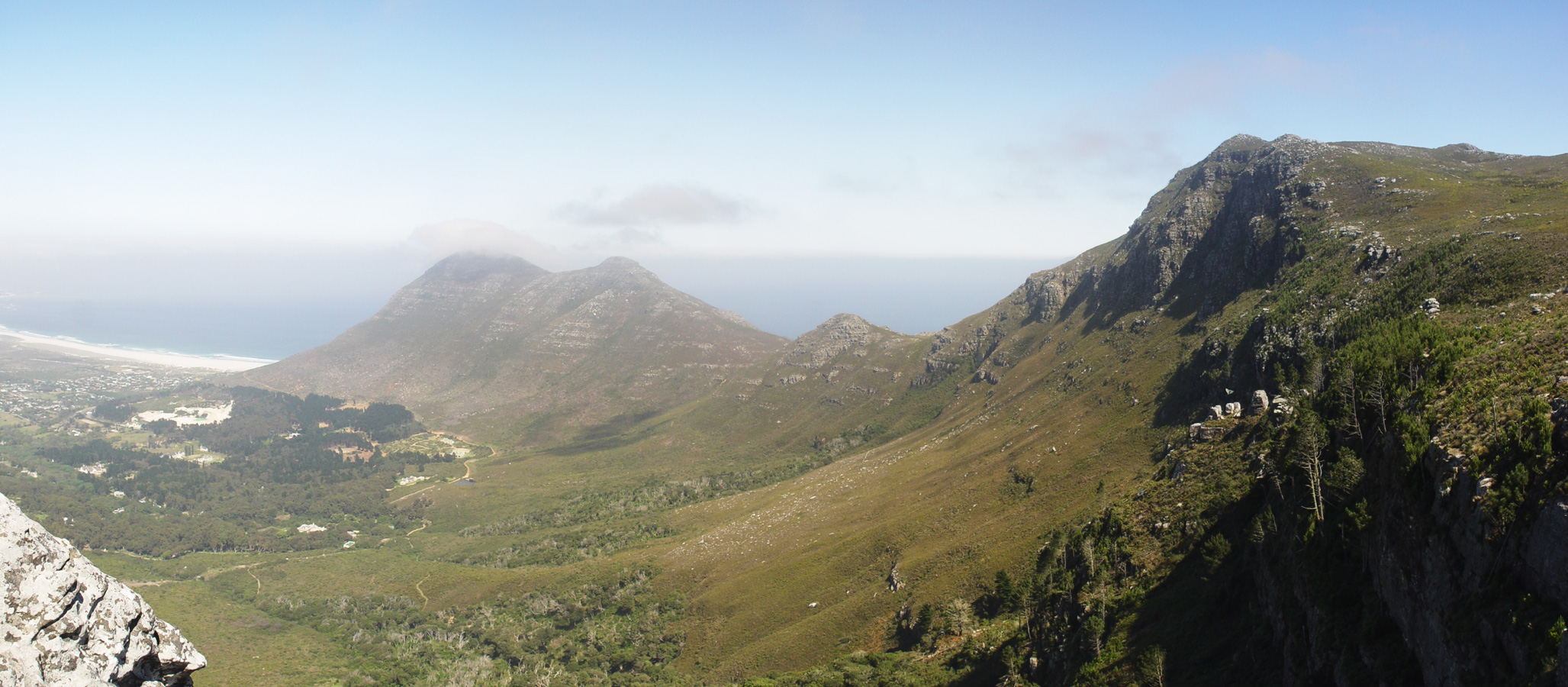 Looking over Noordhoek valley